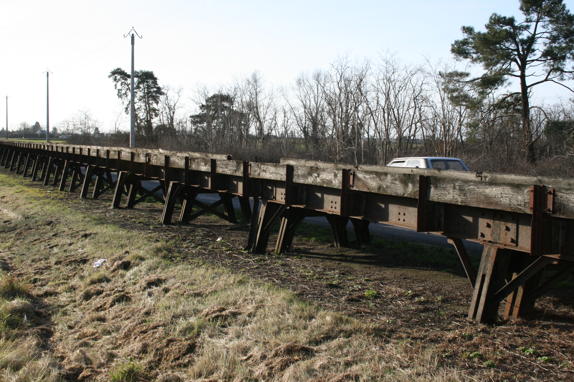 Passerelle du Rio, commune de Sigloy, département du Loiret – France. Pont métallique qui permettait à la ligne Tigy-Châteauneuf-sur-Loire des tramways de Sologne de franchir un bras mort de la Loire.